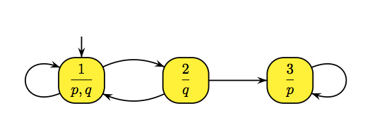 Une structure de Kripke simple